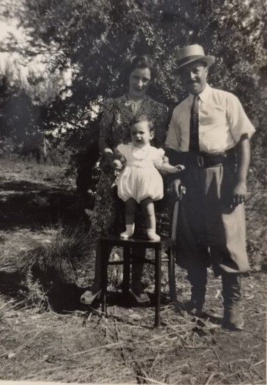 משפחת מתיישבים יהודים באביגדור